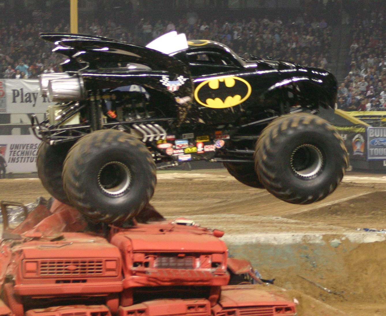 Taken by Jot Powers, 1/2006.